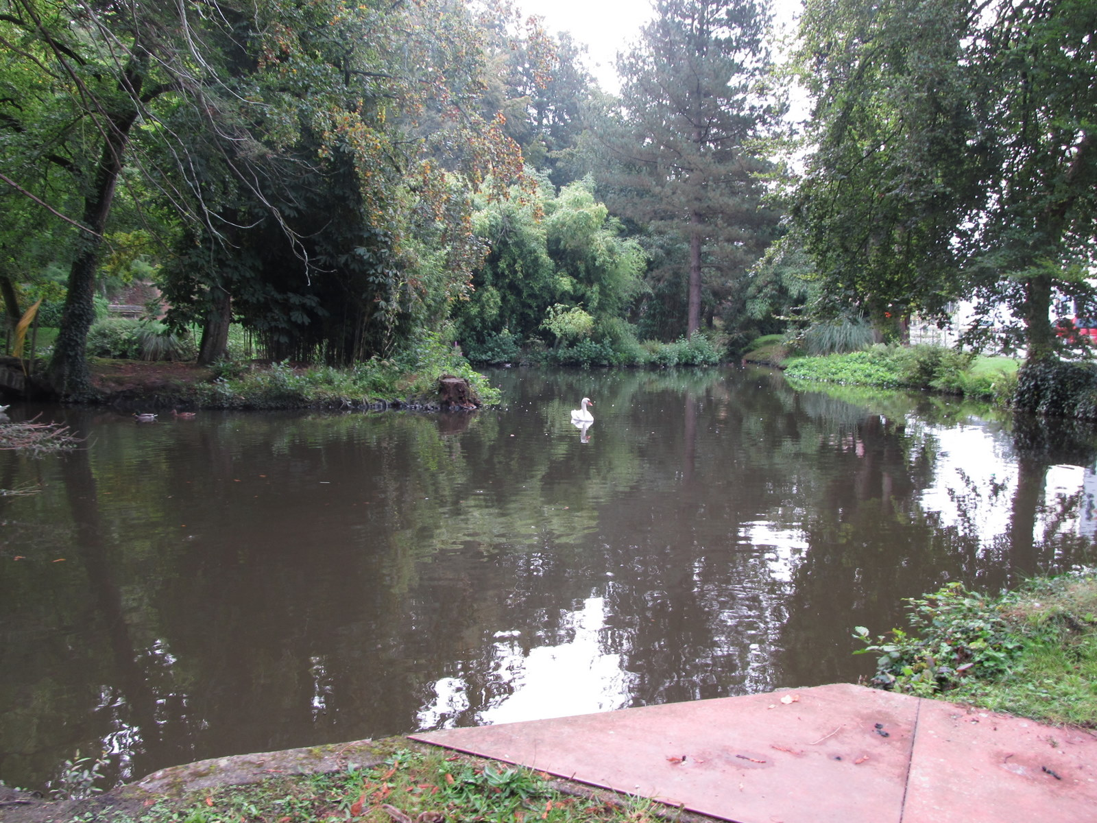 Hennebont